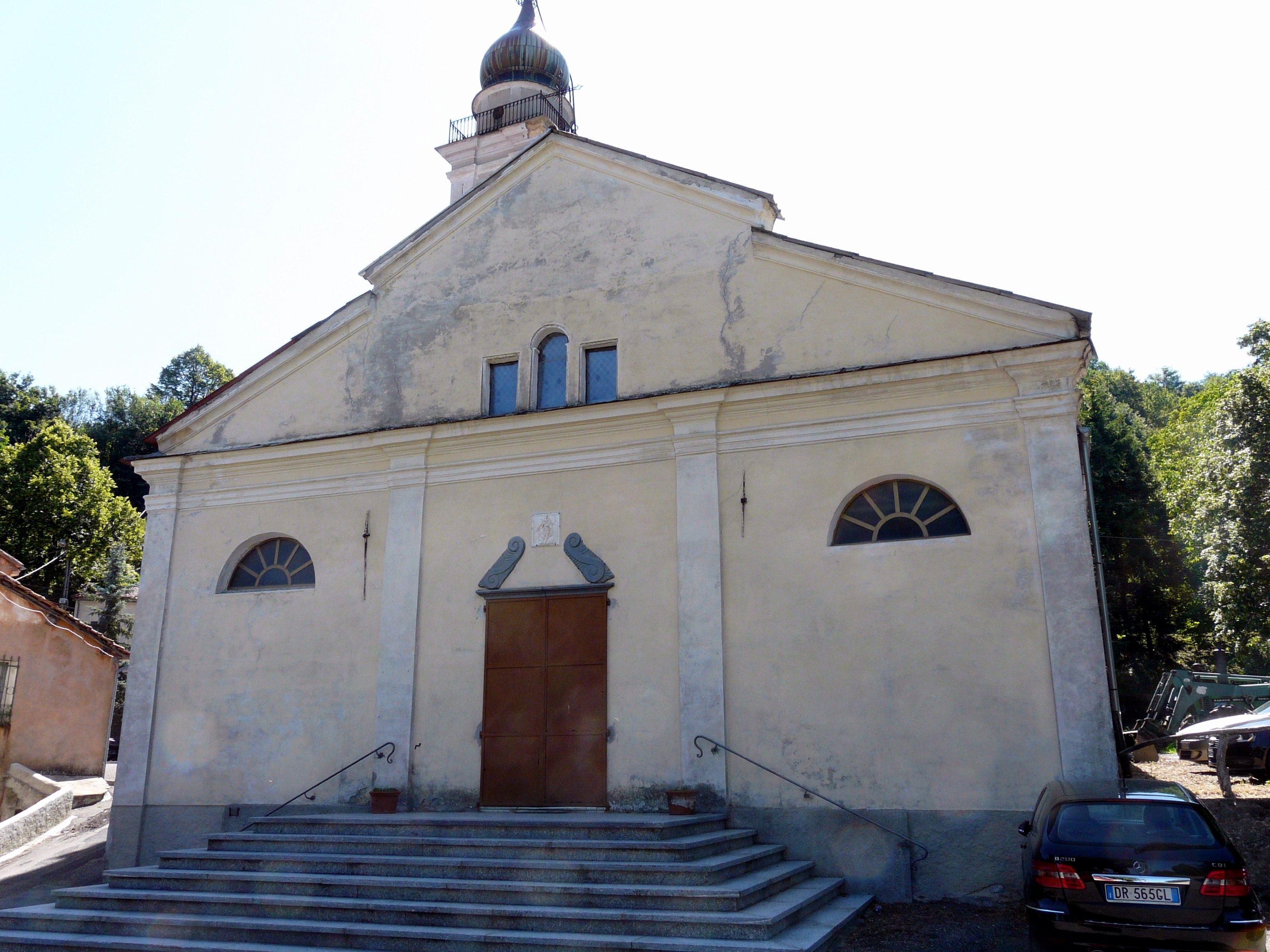 Chiesa di San Giuliano, Carrega Ligure, Piemonte, Italia